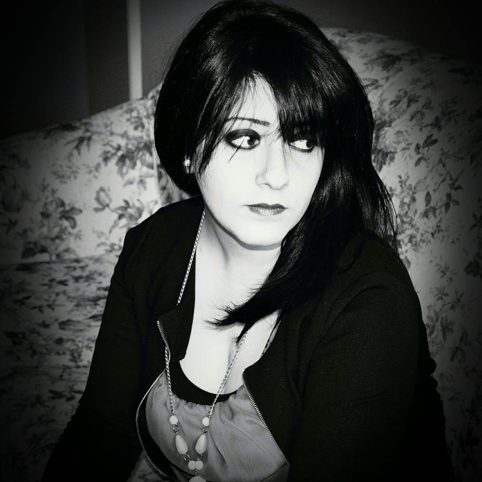 Elena Ricci, giornalista